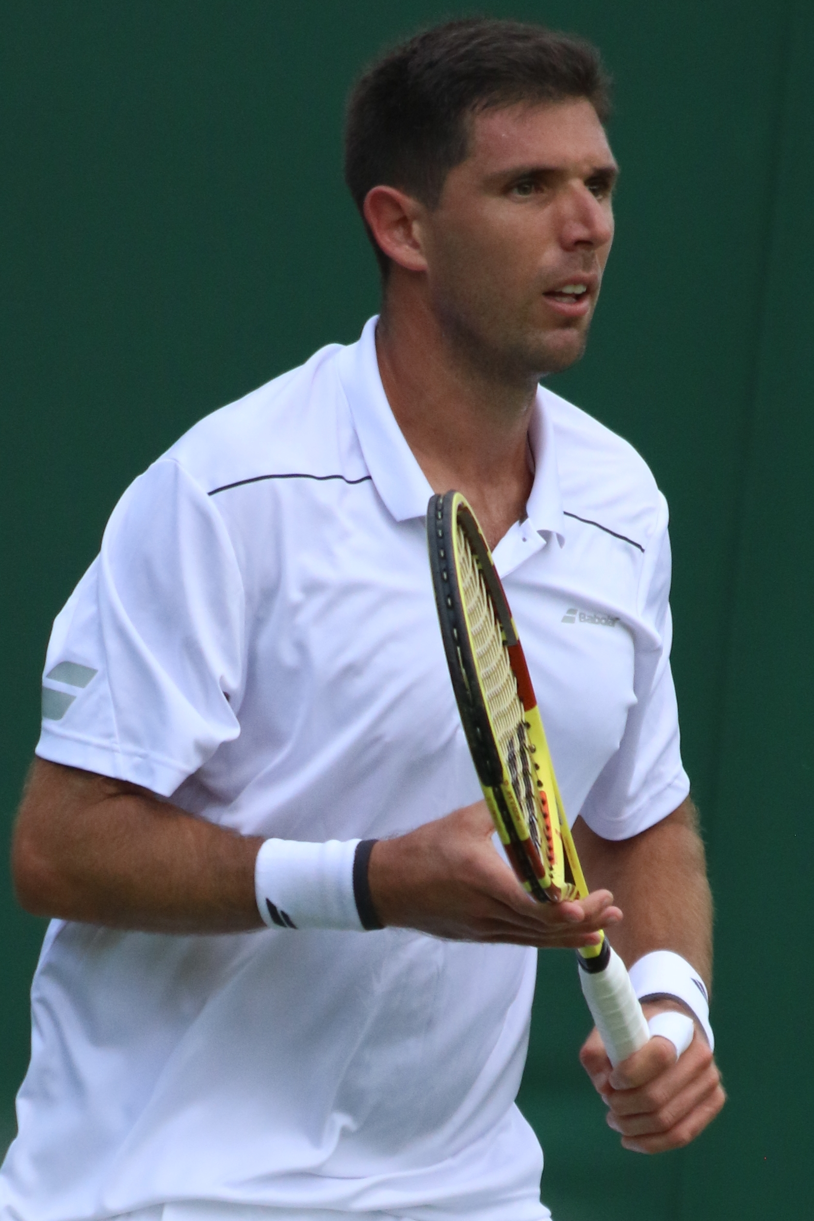 Delbonis WM19 (43)